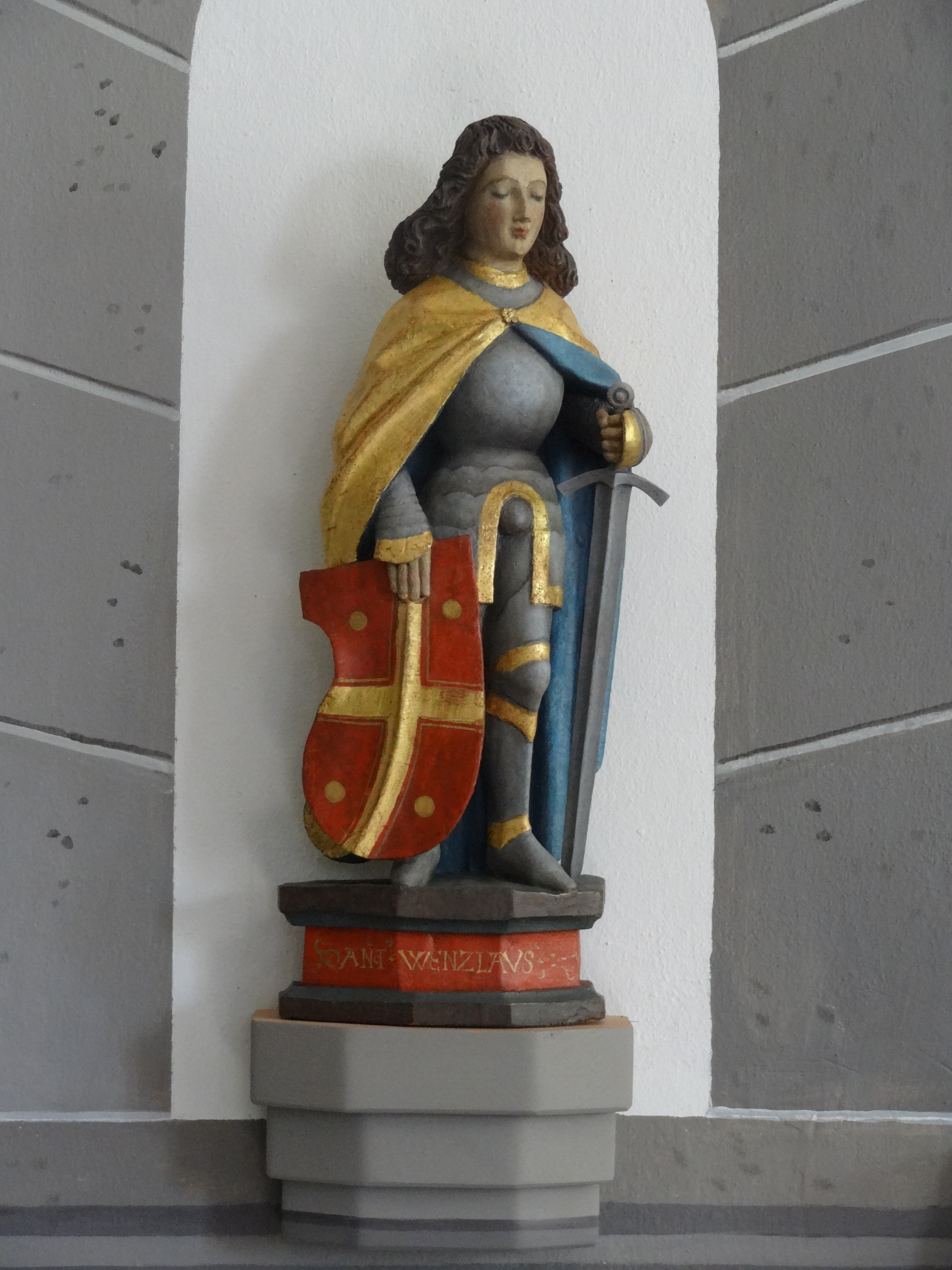 St. Peter (Großen-Linden)